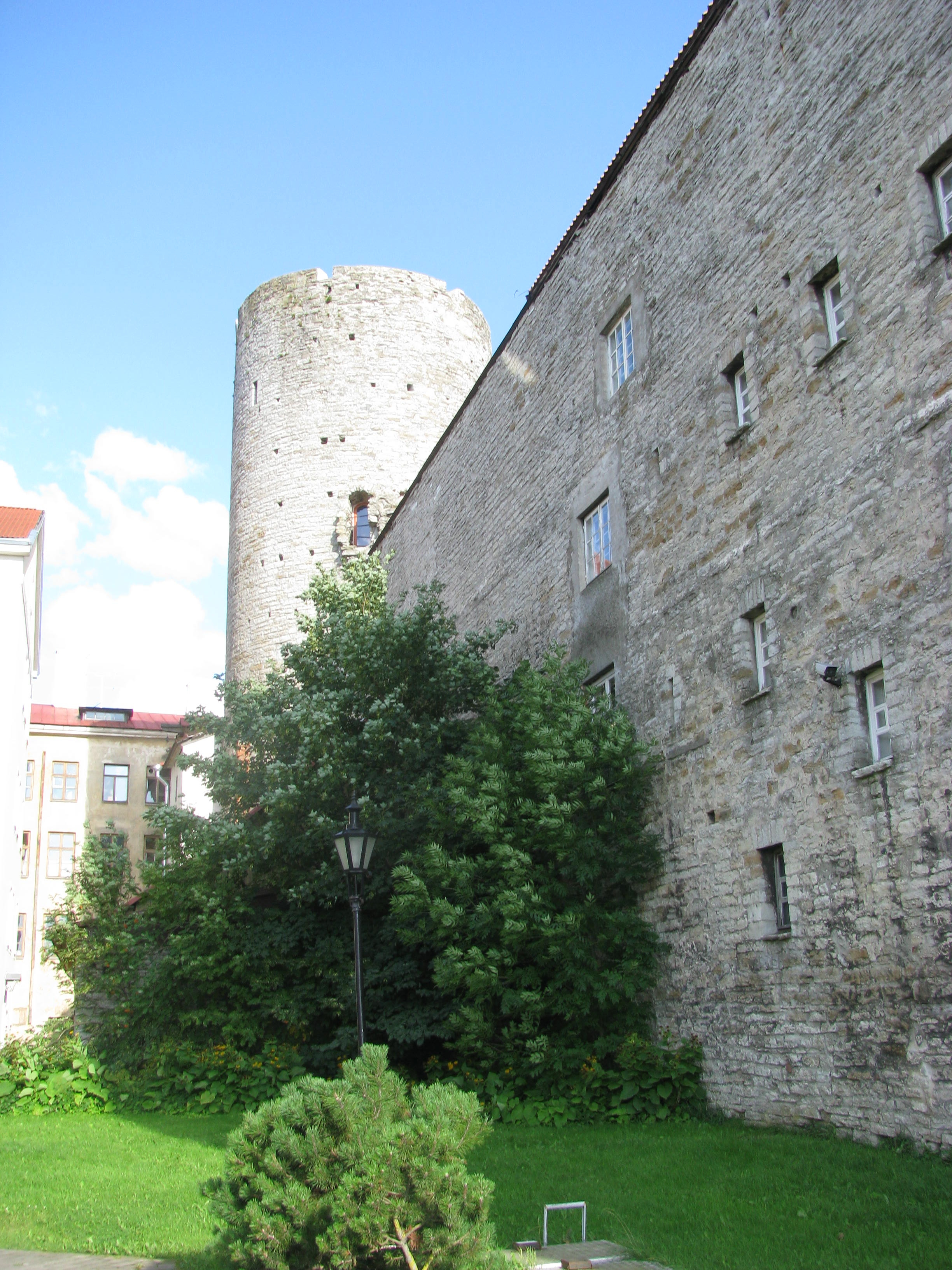 Landskrone torn Toompea lossi kirdenurgas.